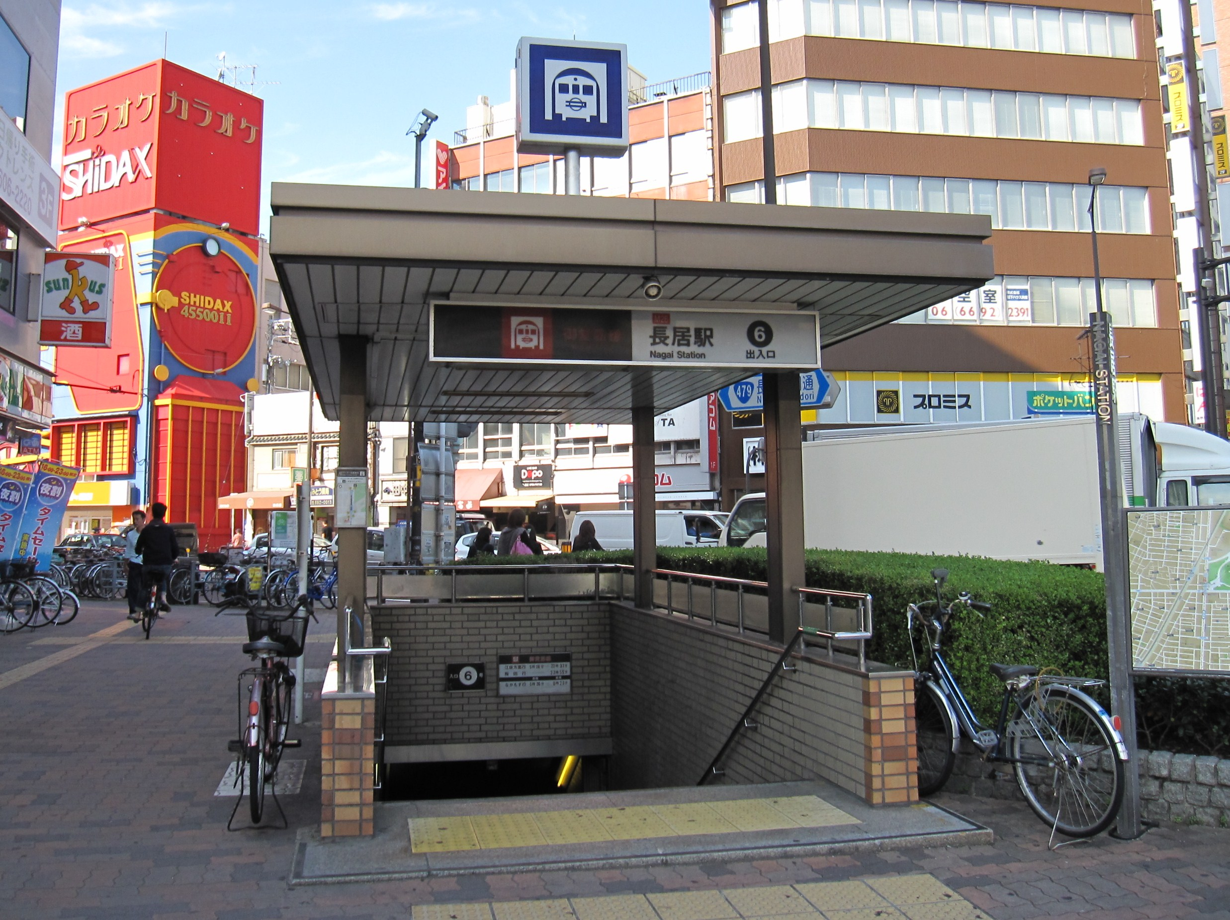 大阪市営地下鉄御堂筋線長居駅